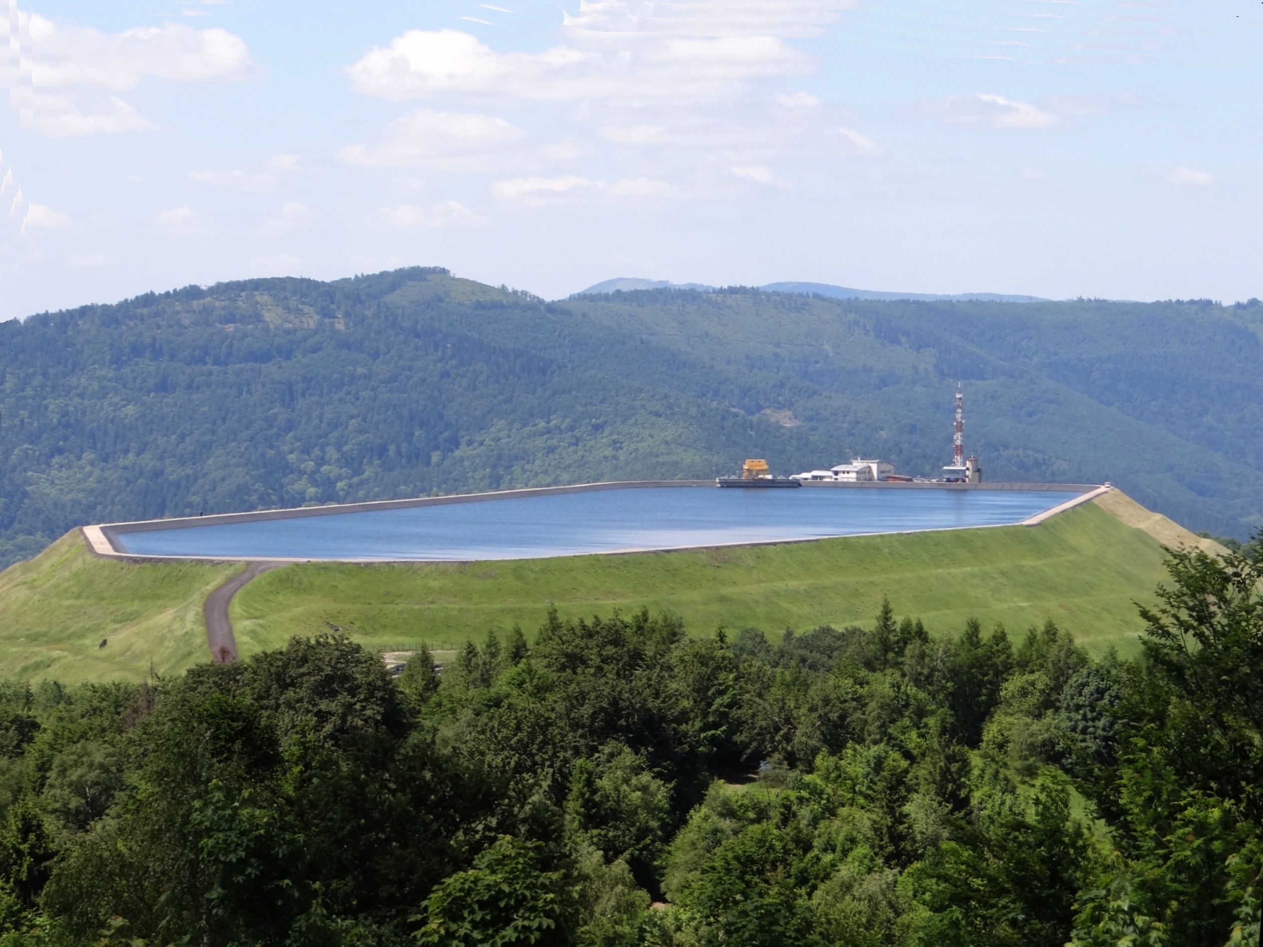 Widok spod szczytu Kiczery